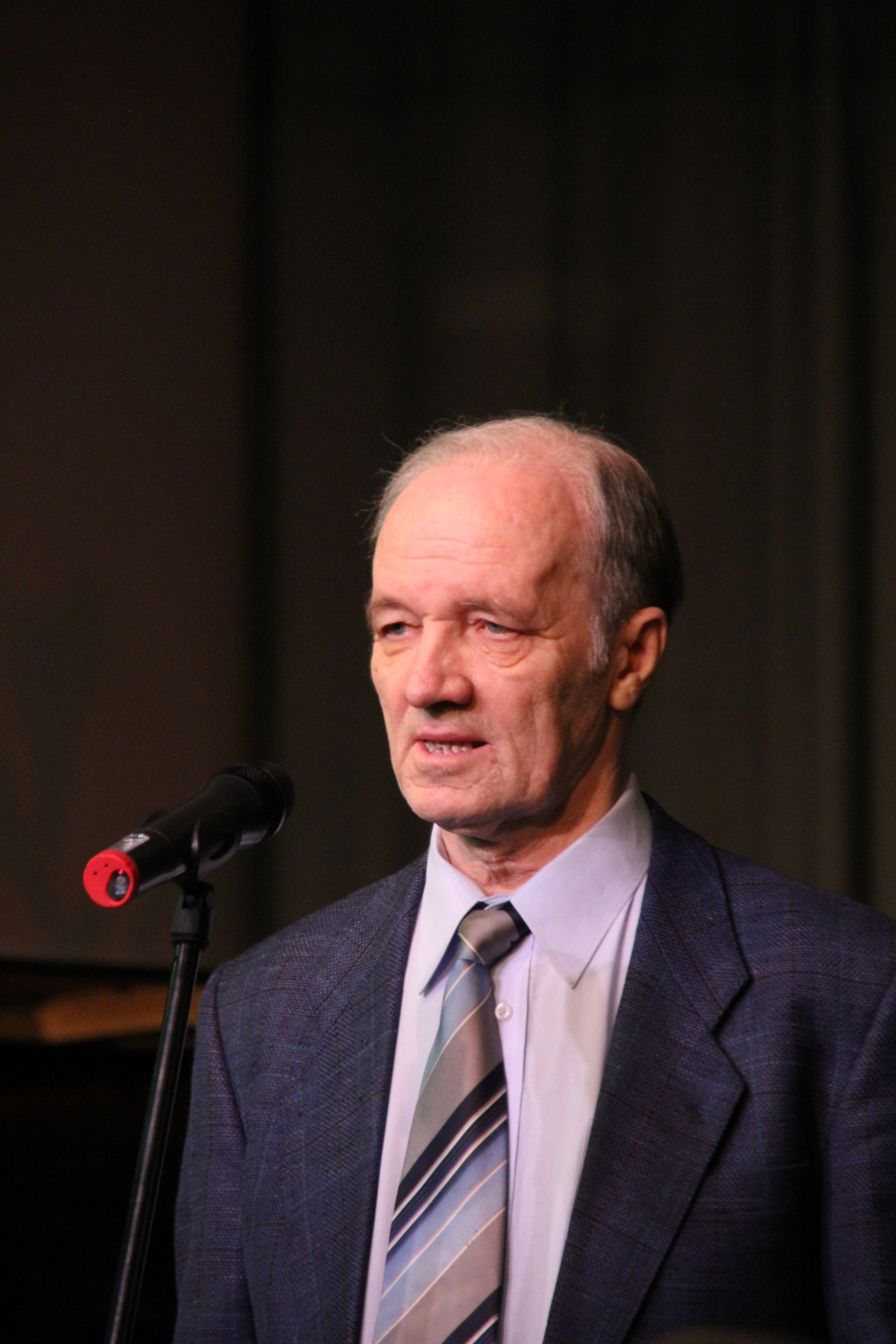 Estonian writer Ülo Tuulik.